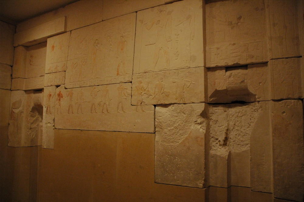 Die Kultkammer des Ka-ni-nisut im Kunsthistorischen Museum Wien von der Mastaba des Ka-ni-nisut aus Giza, Grabung Hermann Junker 1913. Westwand mit zwei Scheintüren. Inv.Nr. 8006